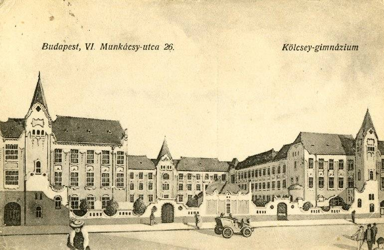 KFG épülete anno